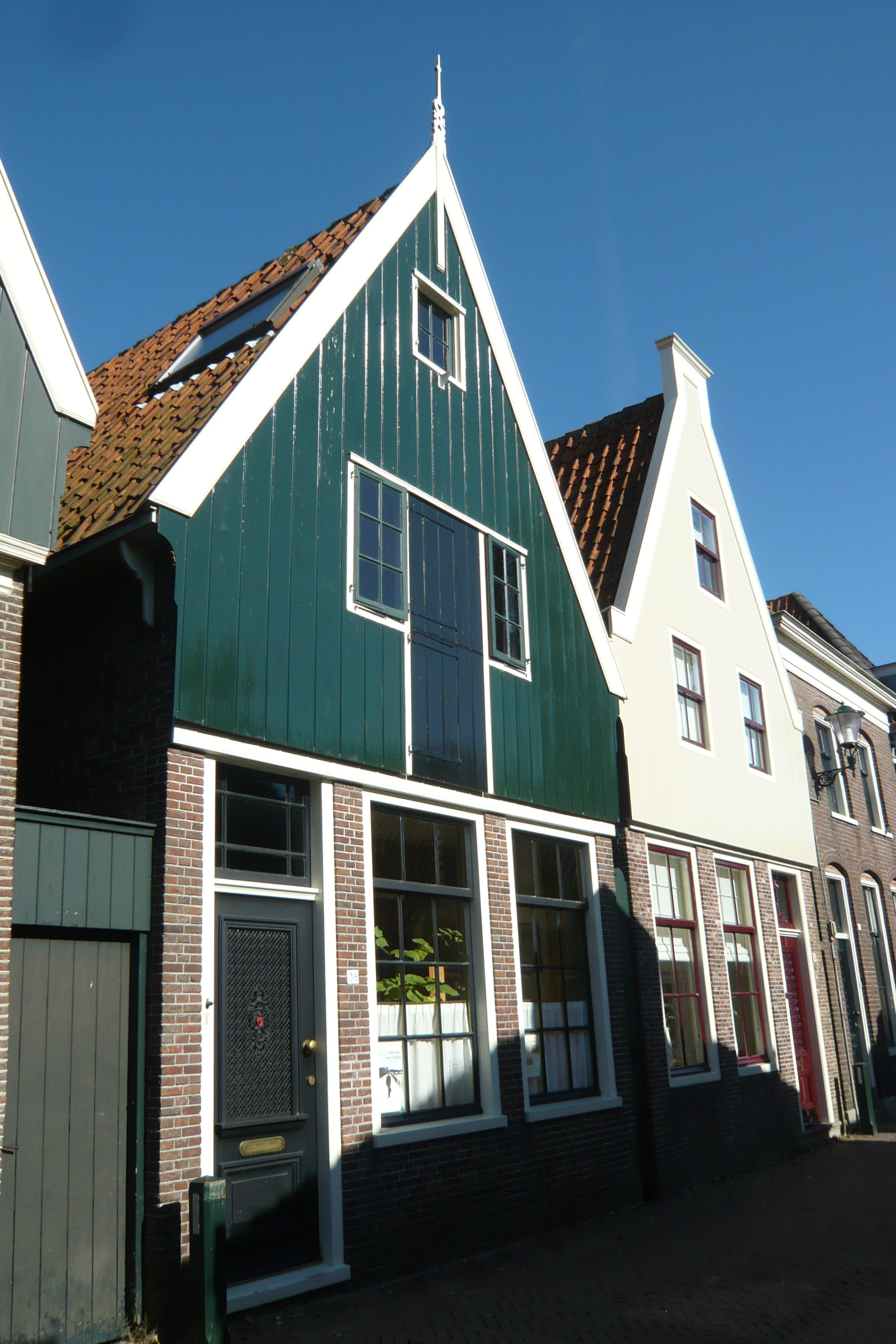 De Rijp-Rechtestraat 38